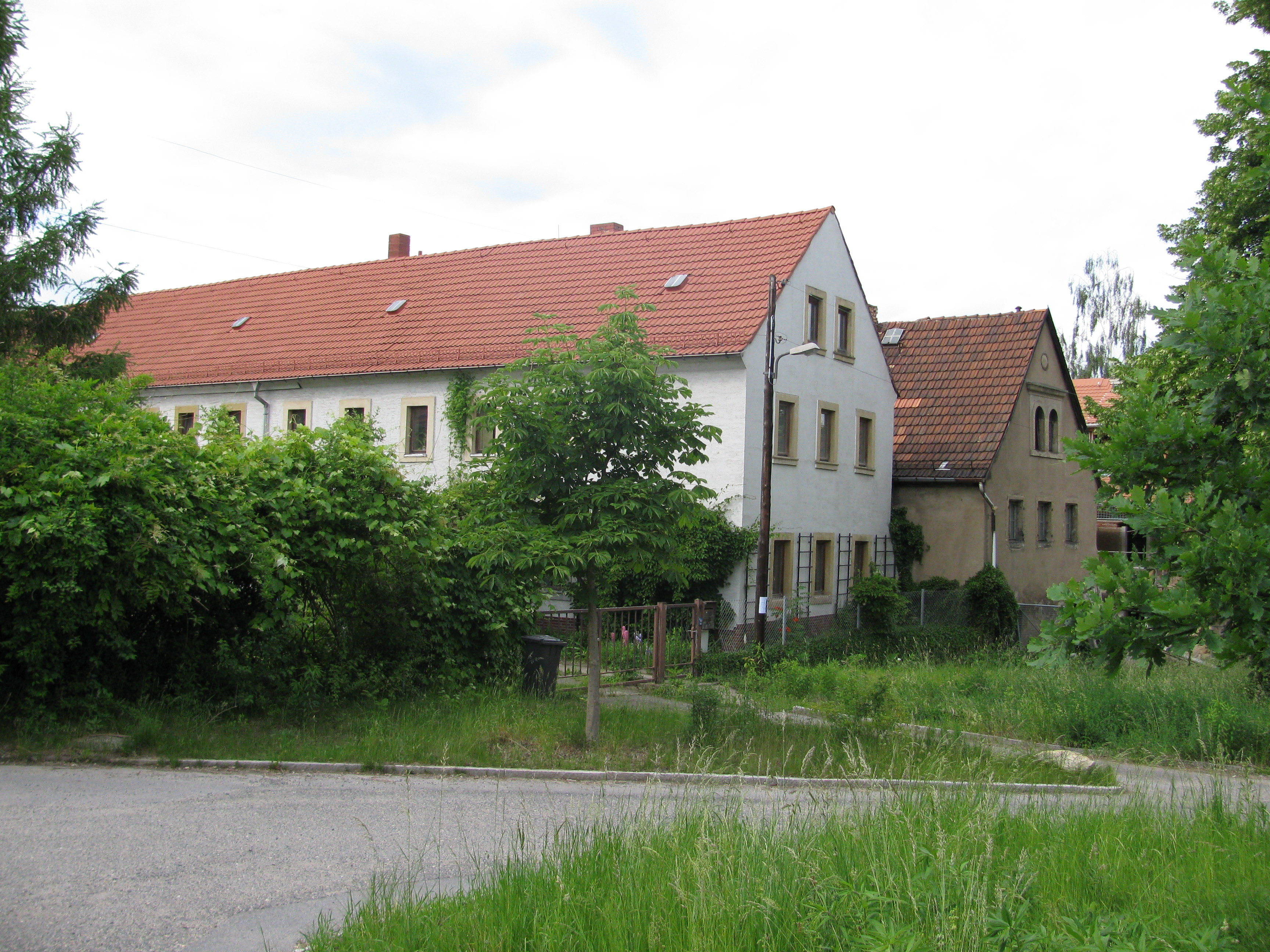 Gebäude im Dorfkern von Großluga, Landeshauptstadt Dresden